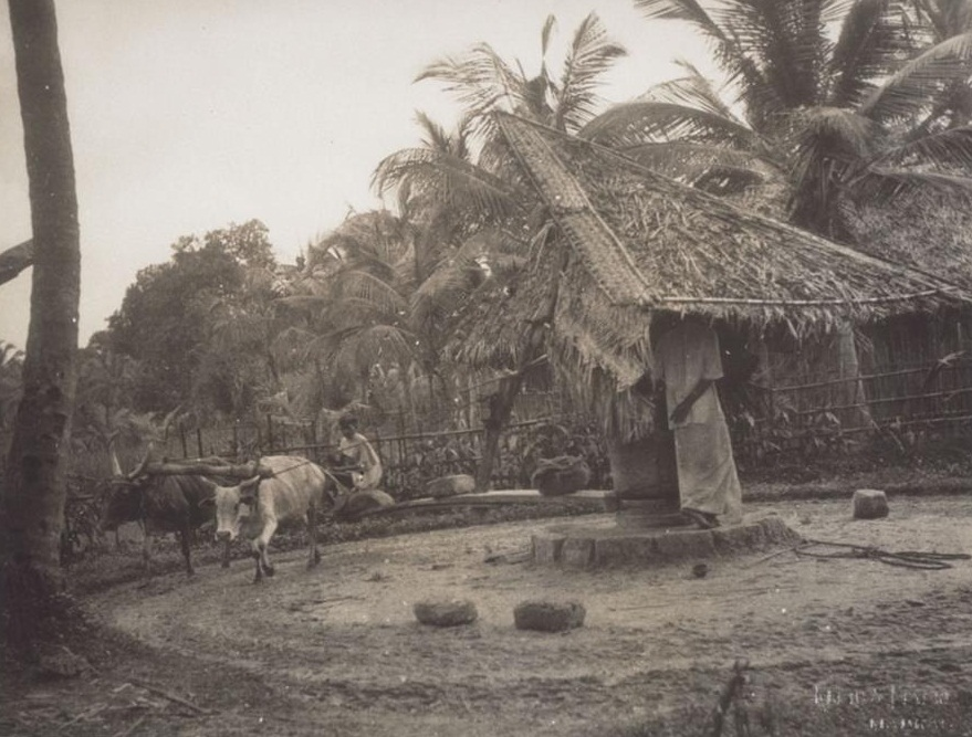 എണ്ണയാട്ടാനുപയോഗിക്കുന്ന ചക്ക് പ്രവർത്തിപ്പിക്കുന്നു.